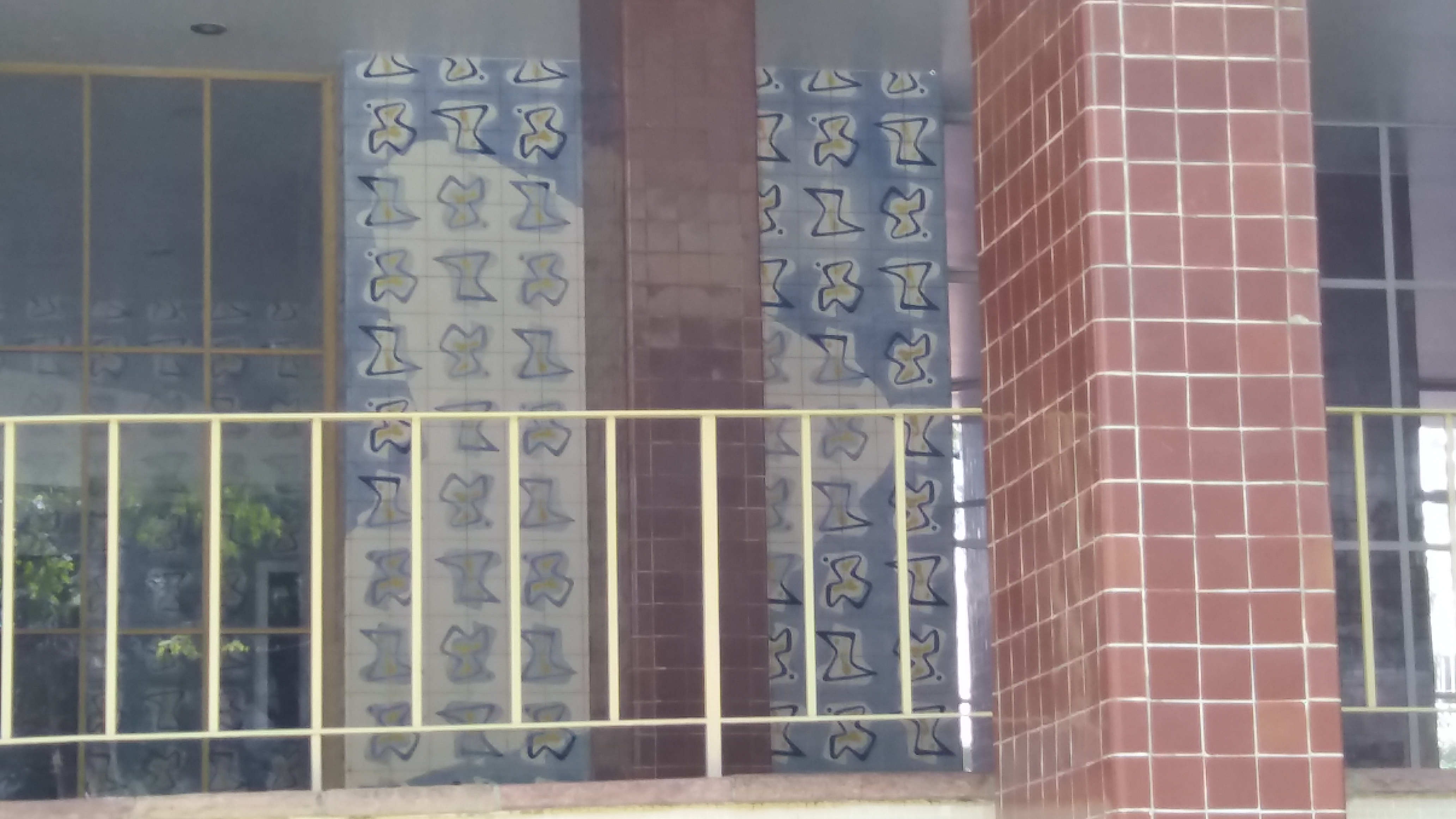 Detalhes da entrada do Edifício Prudência, em São Paulo (SP), Brasil